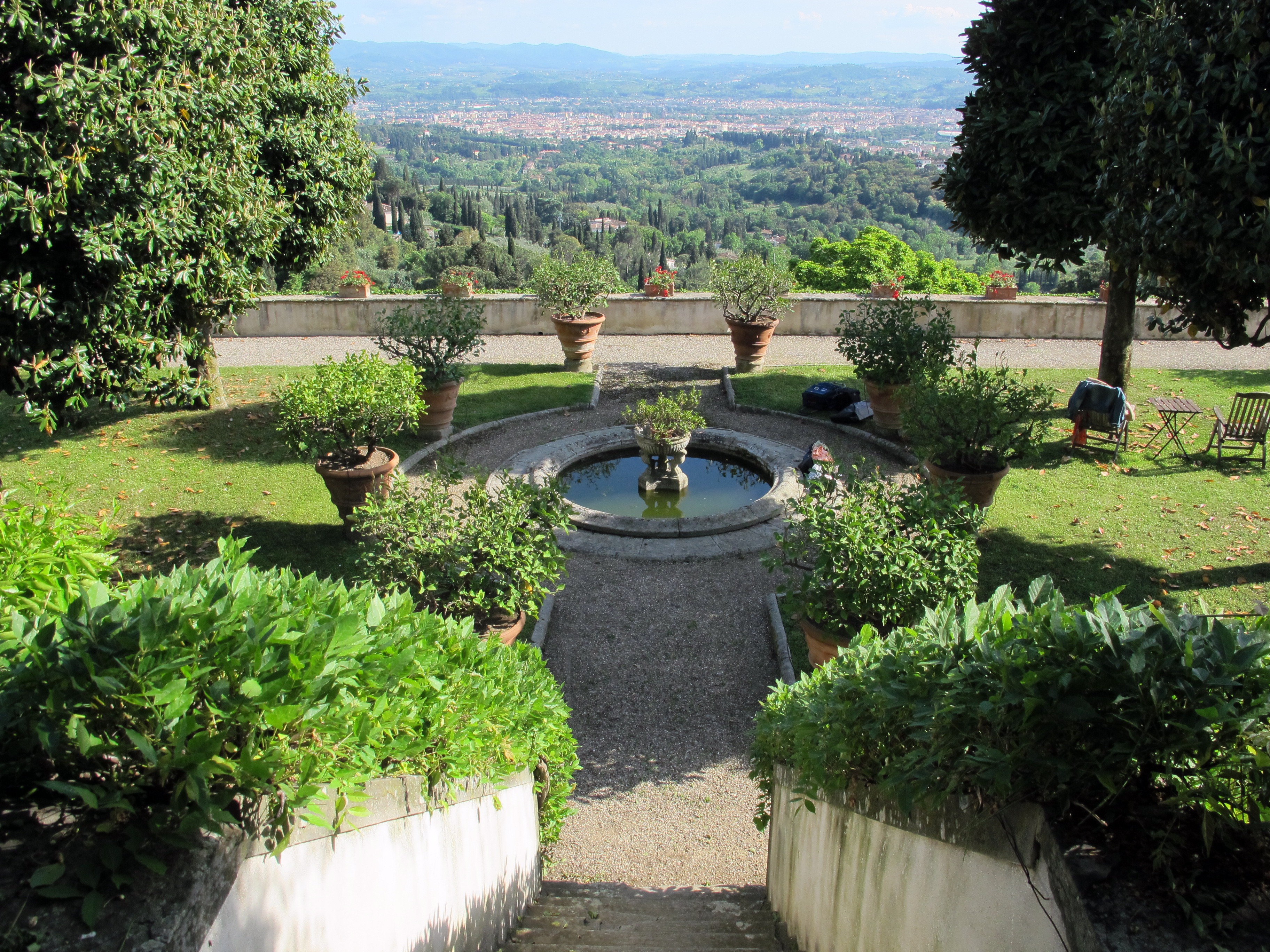 Villa medici di belcanto, terrazza inferiore